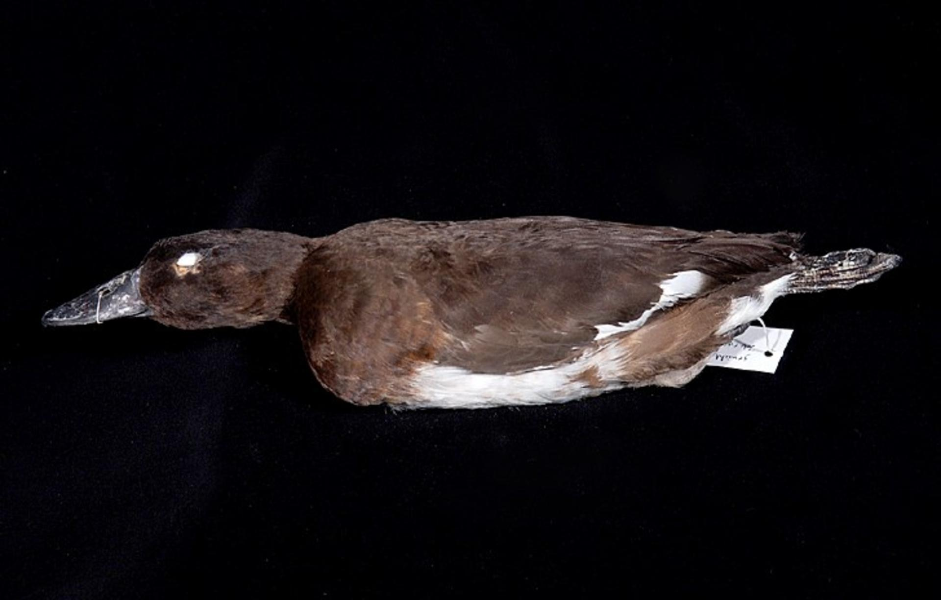 Aythya baeri Radde, 1863